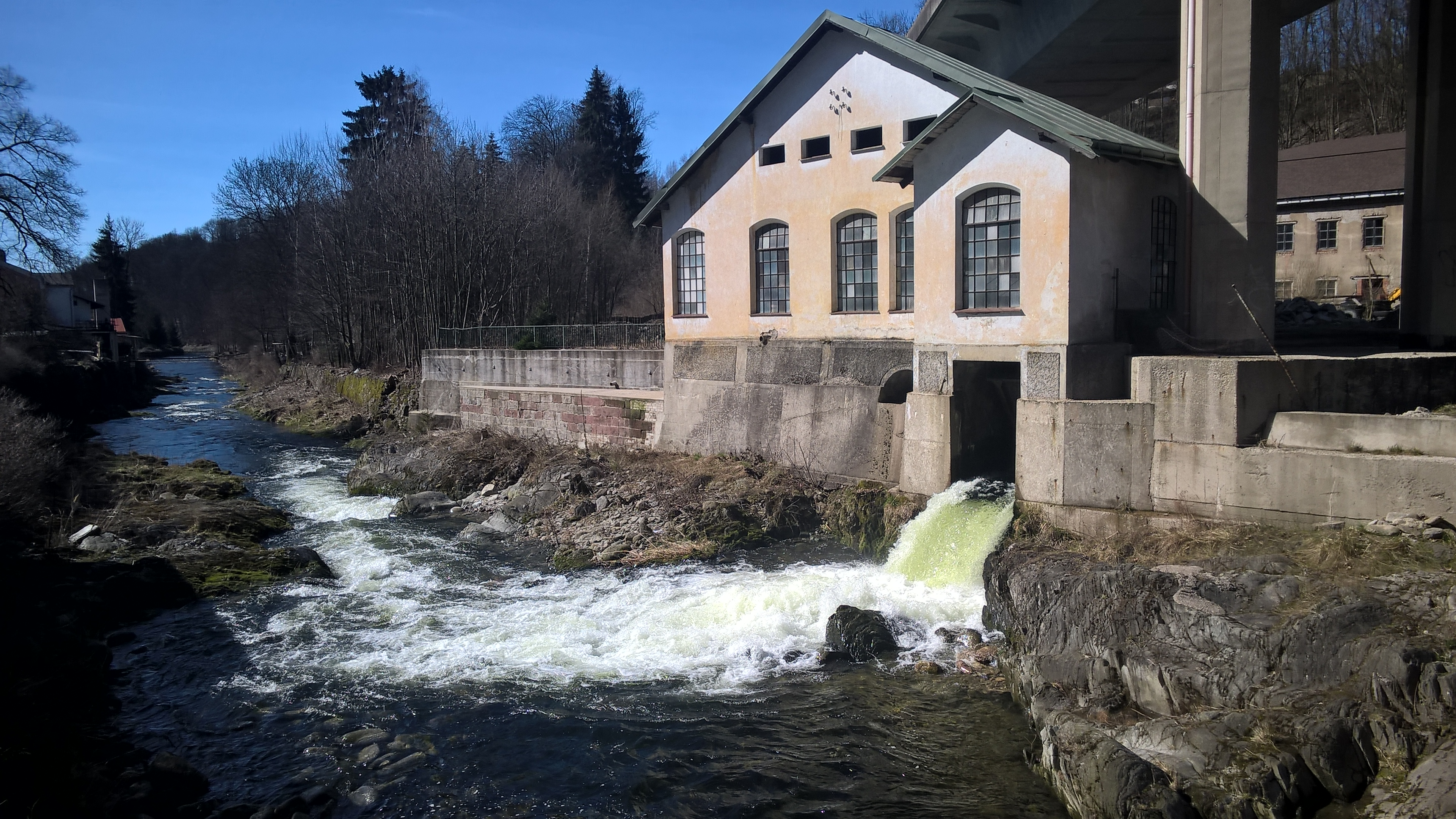 Hořejší Vrchlabí - vodní elektrárna na Labi, pod mostem silnice II/295.